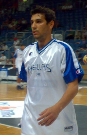 Nikolaos Zisis, griechischer Basketballspieler